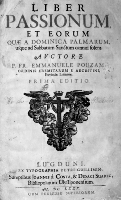 Liber Passionum, et eorum quae a Dominica Palmarum, usque ad Sabbatum Sanctum cantari solent de Frei Manuel Pousão, publicado em Lyon no ano de 1675. É um livro de Paixões em cantochão.